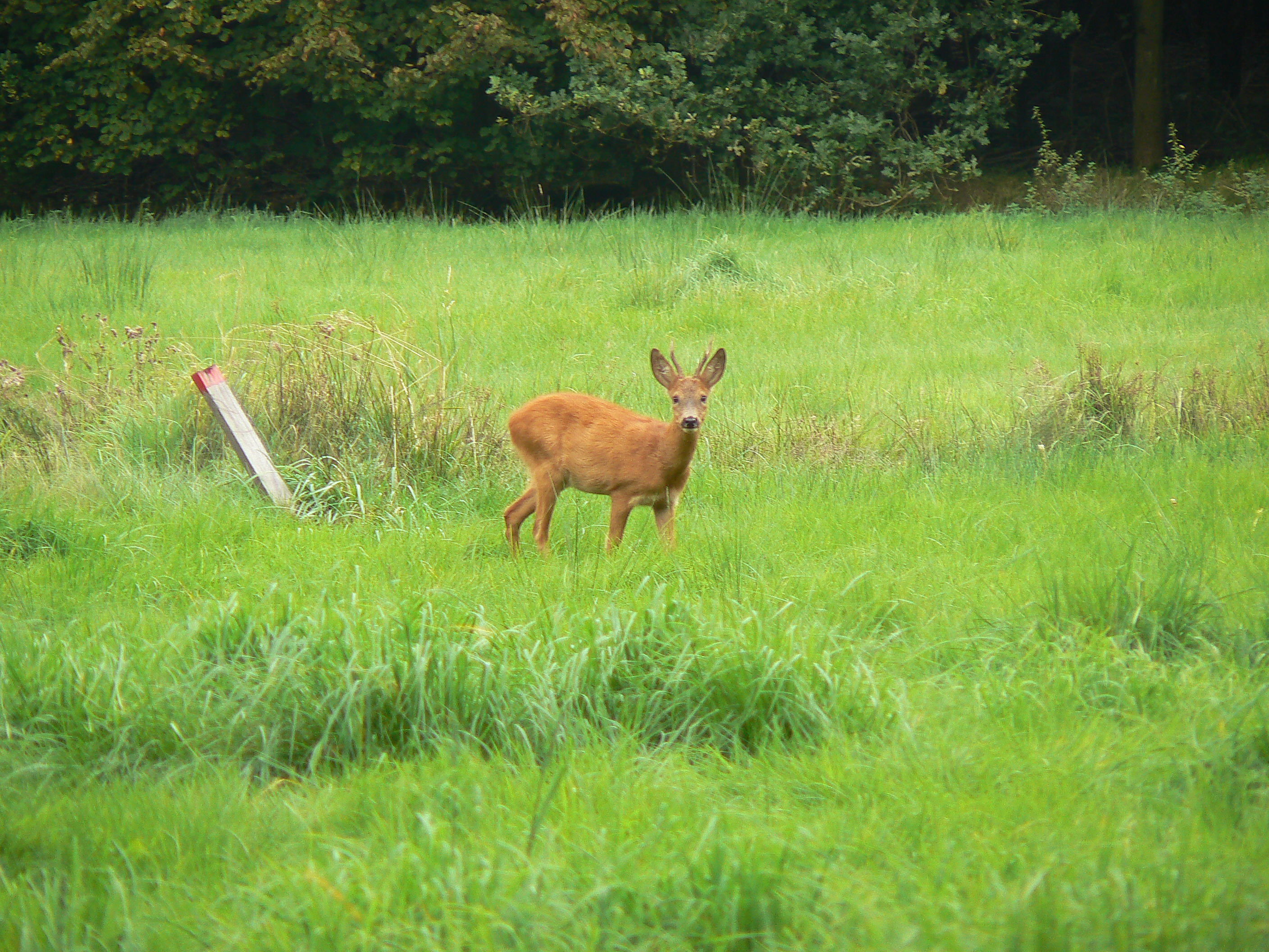 Hooiland met ree (Capreolus capreolus), De Inslag, Brasschaat (Antwerpen)